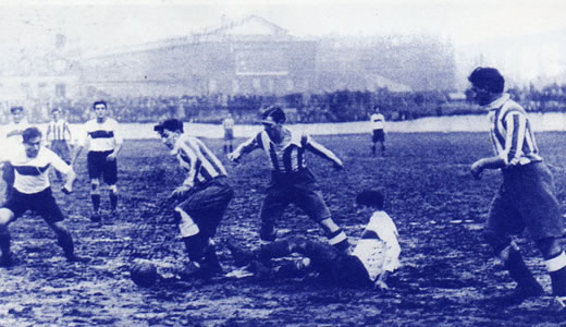 Foto durante un partido de Gimnasia y Esgrima La Plata, jugado en París (Francia) en la gira europea de 1930-31.